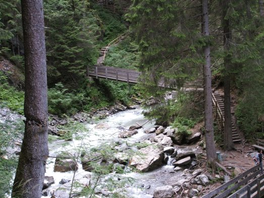 Cascate di Stanghe, orrido di Francesco Giuseppe (other)